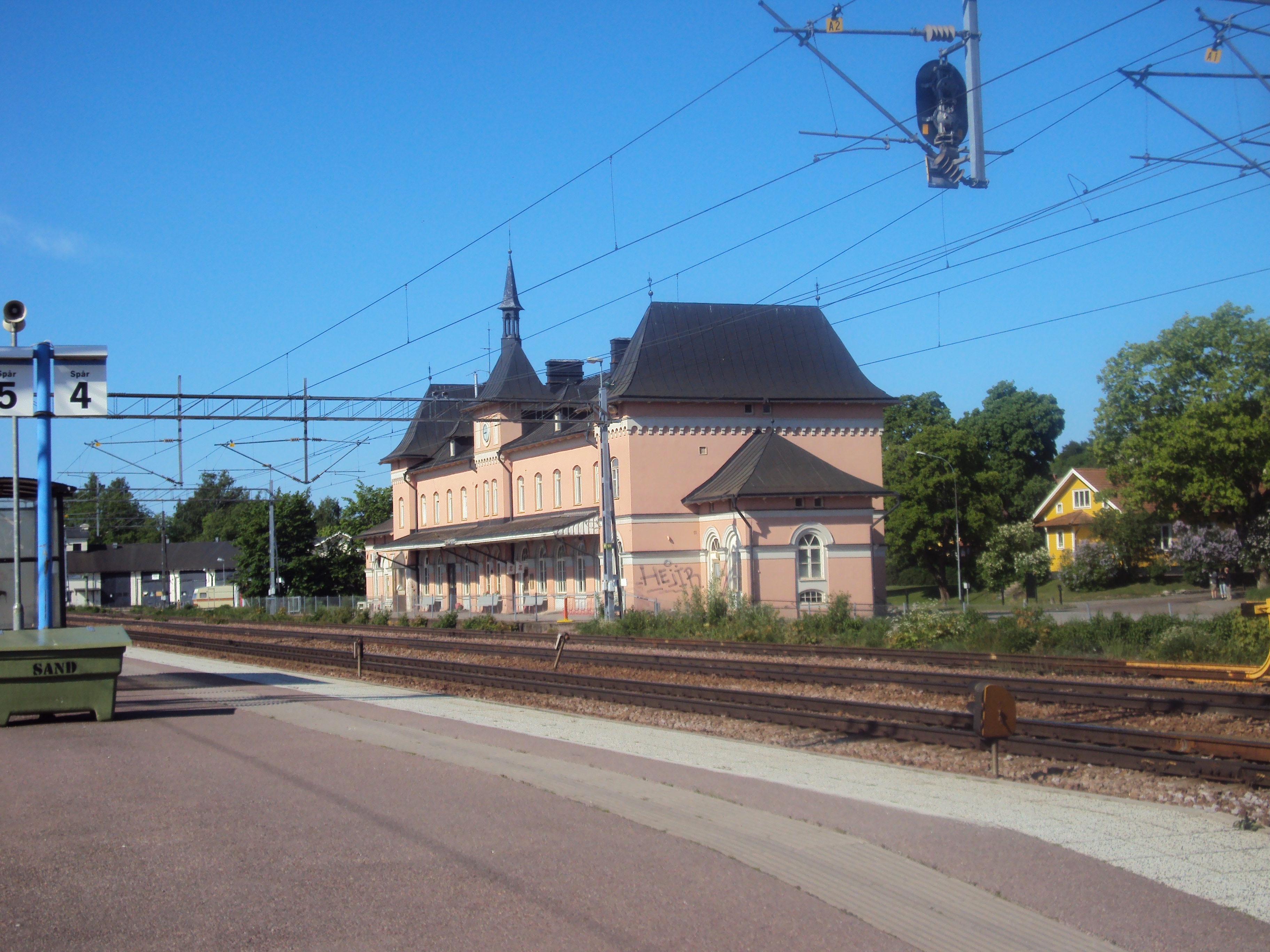 Storviks järnvägsstation